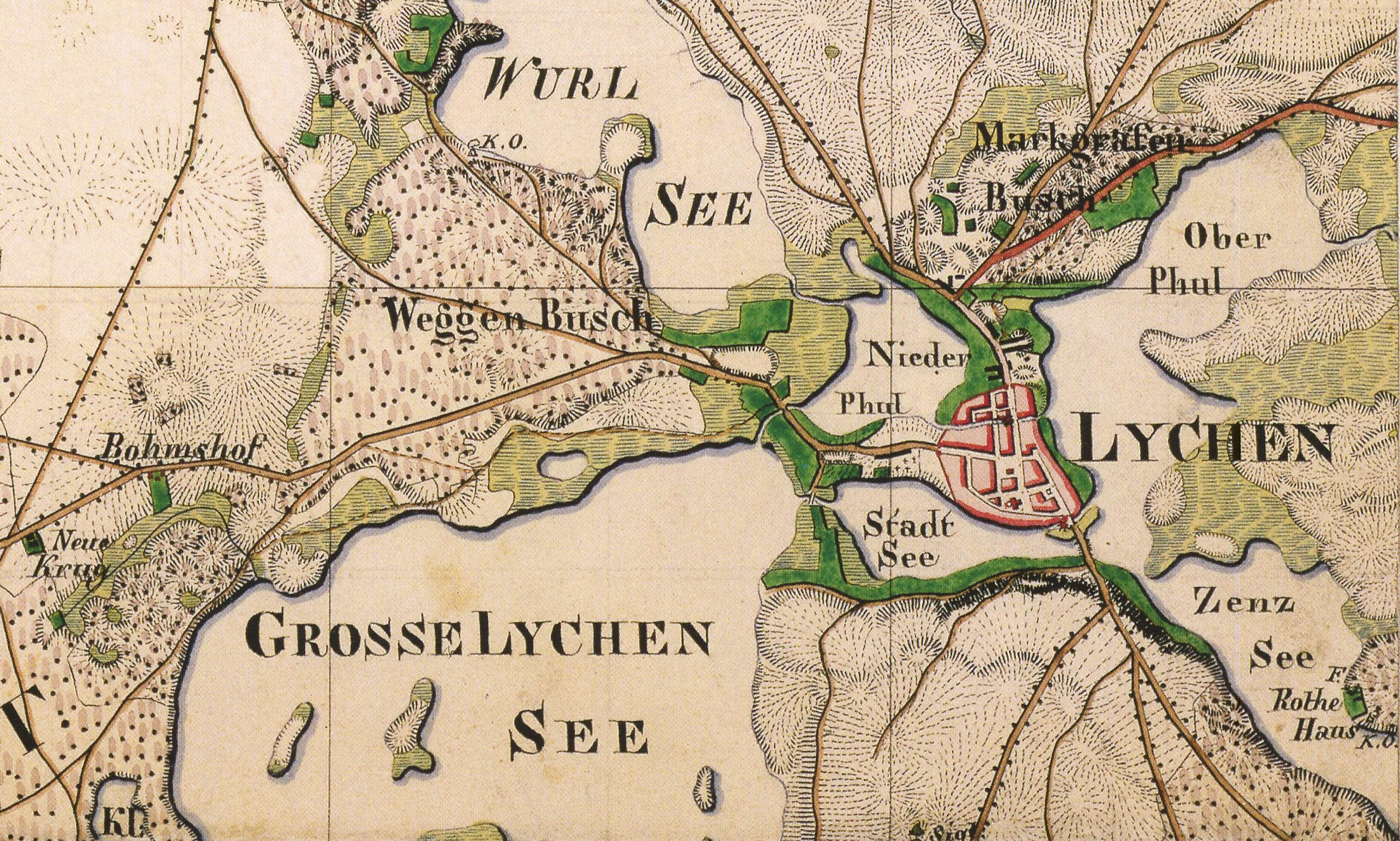 Lychen, Lkr. Uckermark, Brandenburg, Ausschnitt aus dem Urmesstischblatt Blatt 2745 Lychen von 1825